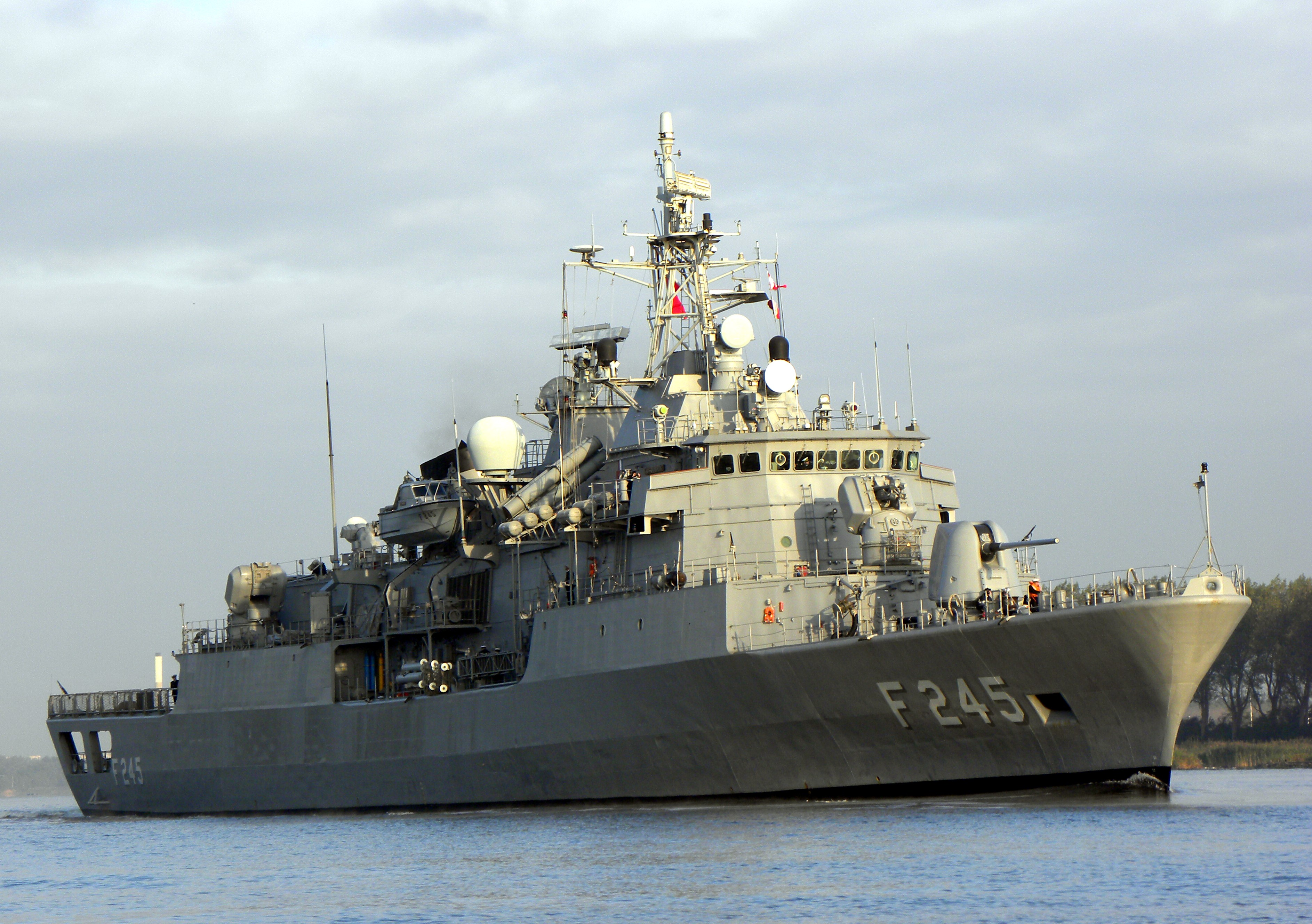 F 245 TCG OruçReis Barbarcos class Figate